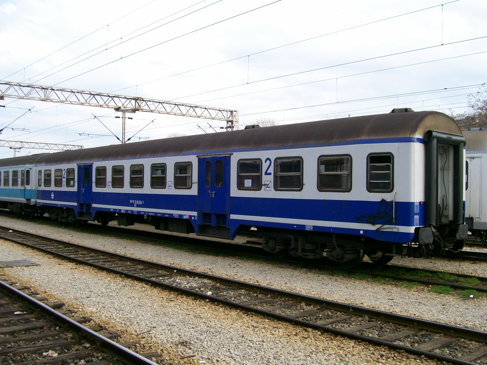 Vagon sa sjedalima 2. razreda Hrvatskih željeznica (Slovna serija Bt)